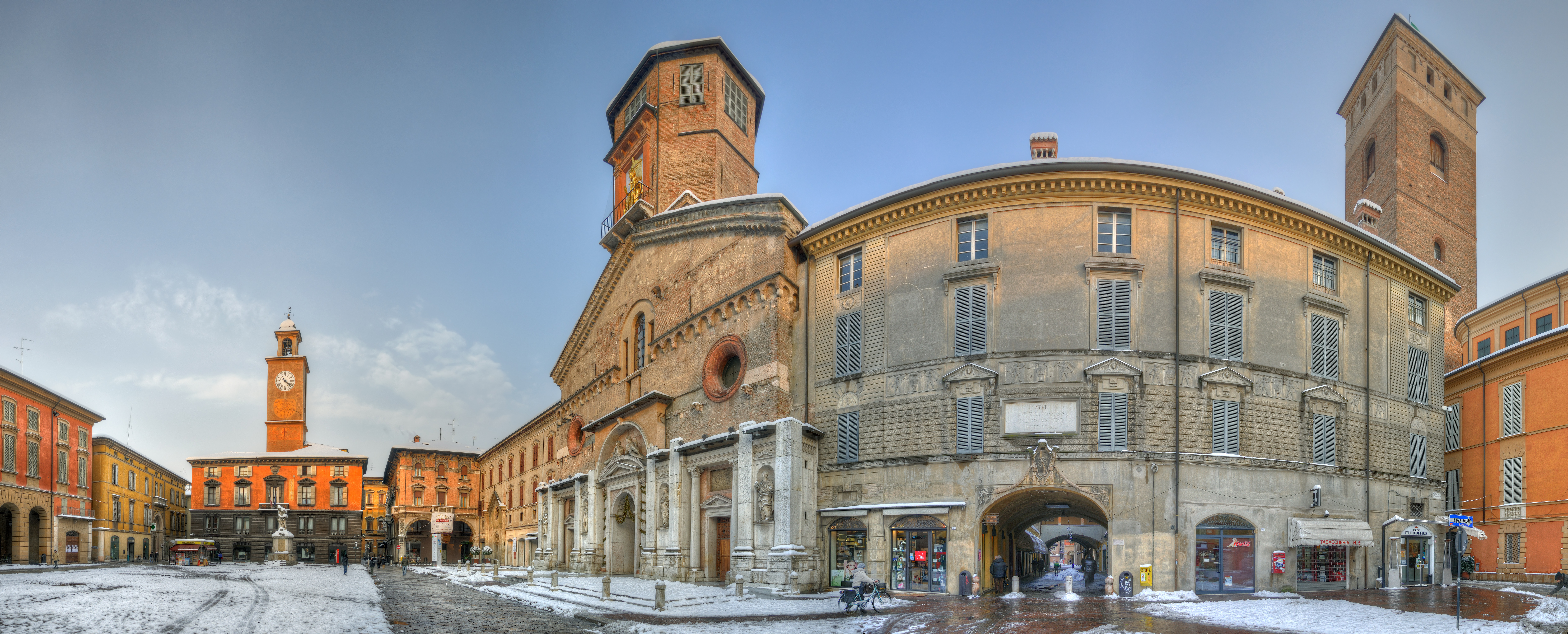 Handheld HDR panorama (Nikon D90)